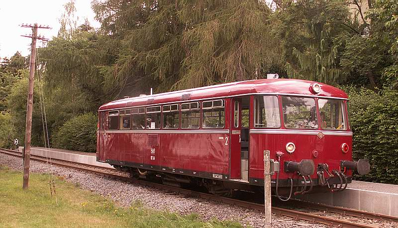 Verbrennungstriebwagen der Baureihe 798 im Bahnhof Schleiden.